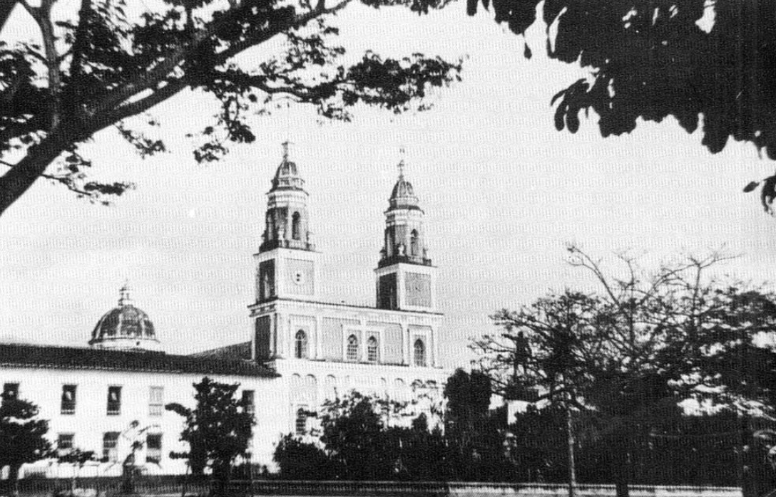 Iglesia de San Laureano de Bucaramanga foto histórica